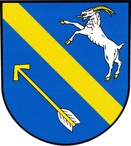 Znak obce Střelské Hoštice.